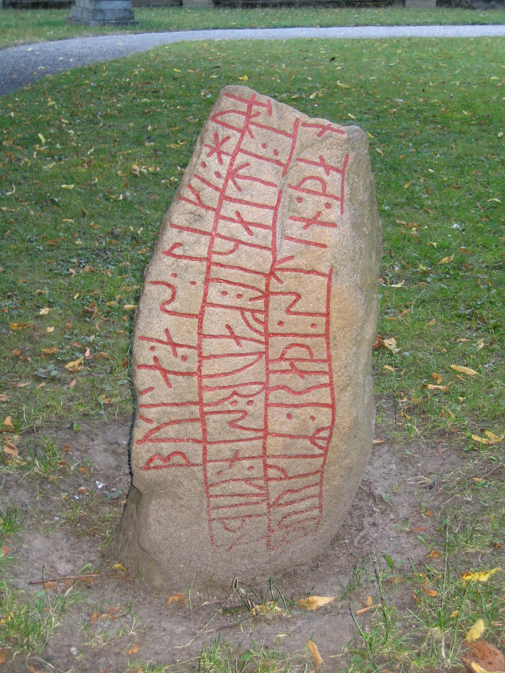 Sjörupstenen (Dalbystenen), Kulturen i Lund, signum DR 298.